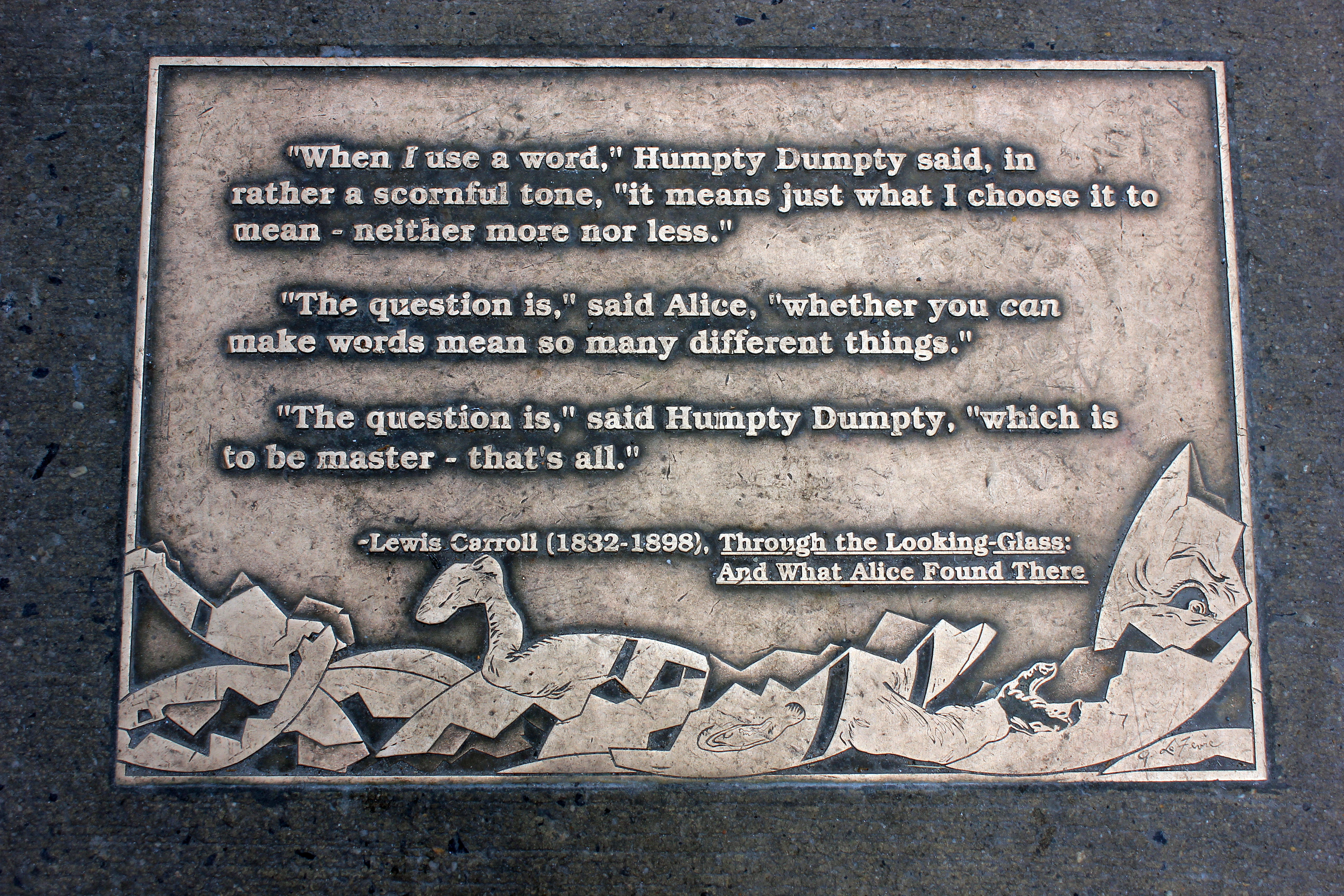 Library Walk in New York City